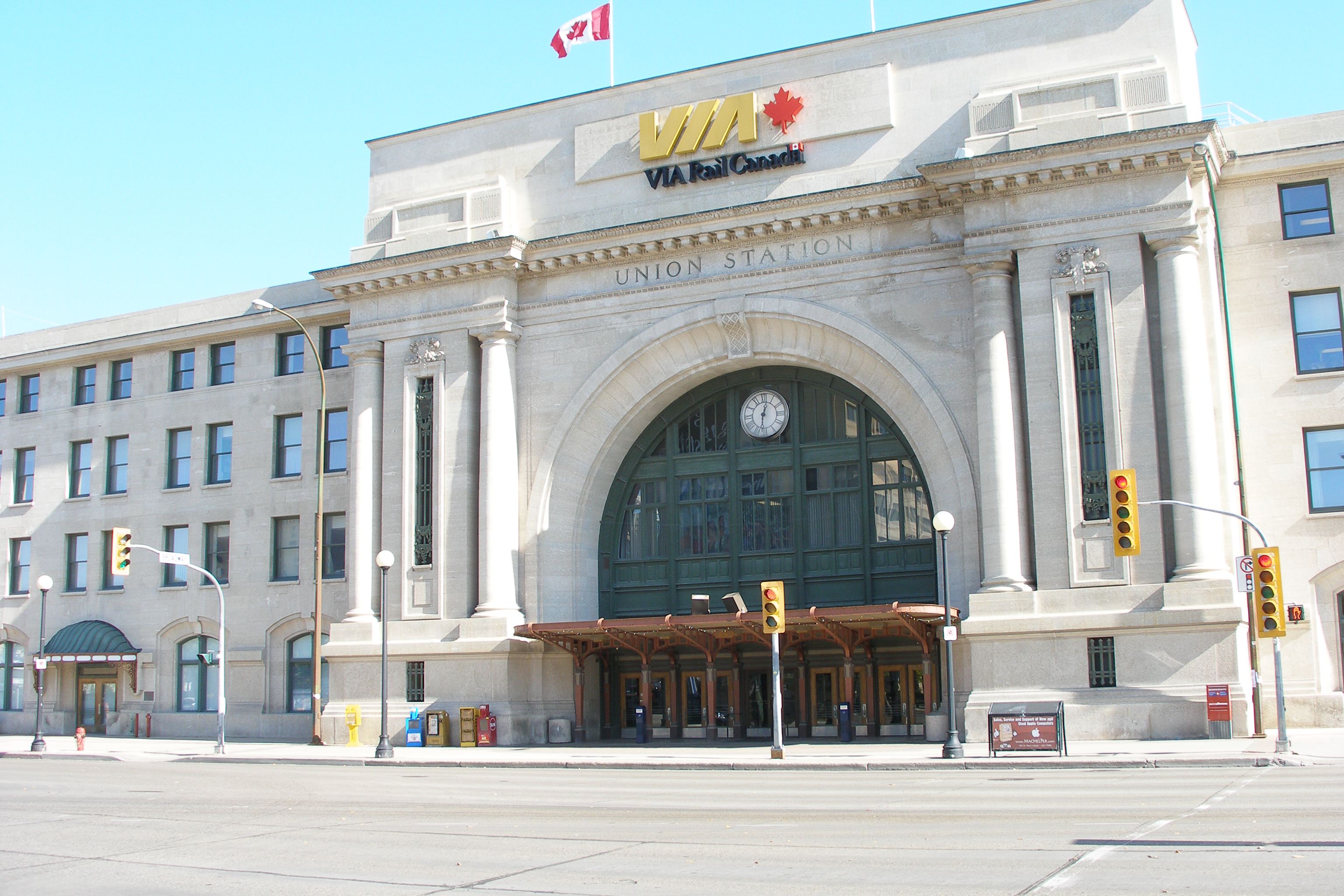 Winnipeg 2008